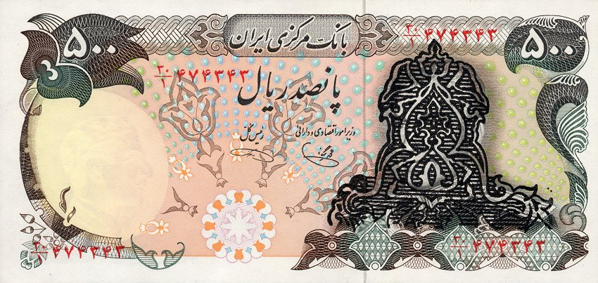 500 иранских риалов обр. 1974/1979. Аверс. Запечатка на изображении шаха Пехлеви "Вычурный рисунок".